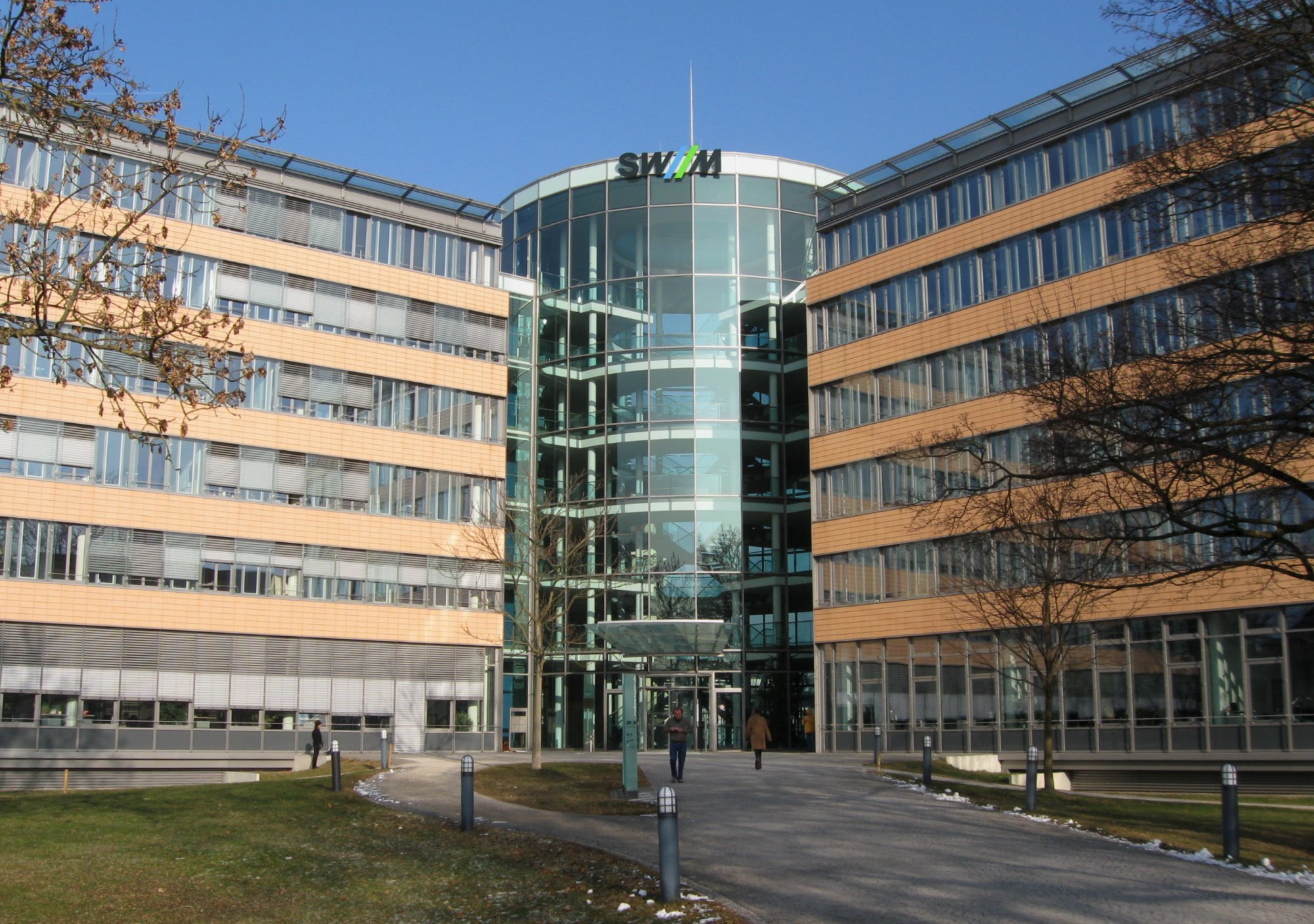 Zentrale der Stadtwerke München, Emmy-Noether-Straße 2